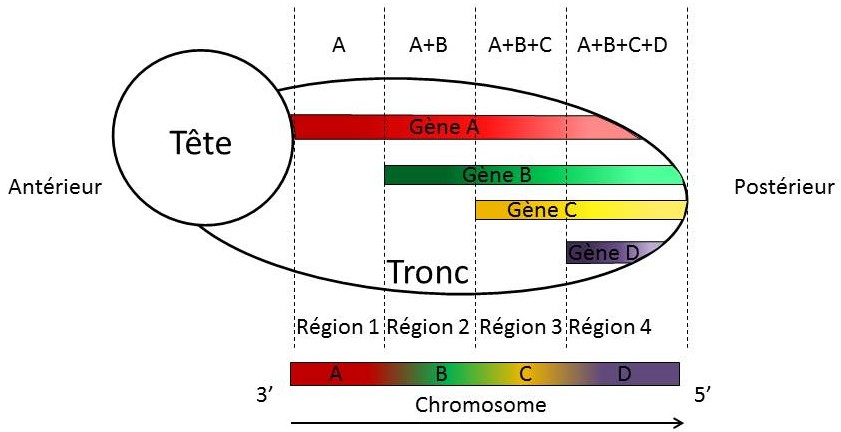 Les gènes homéotiques s'expriment de manière colinéaire le long de l'axe antéro-postérieur.